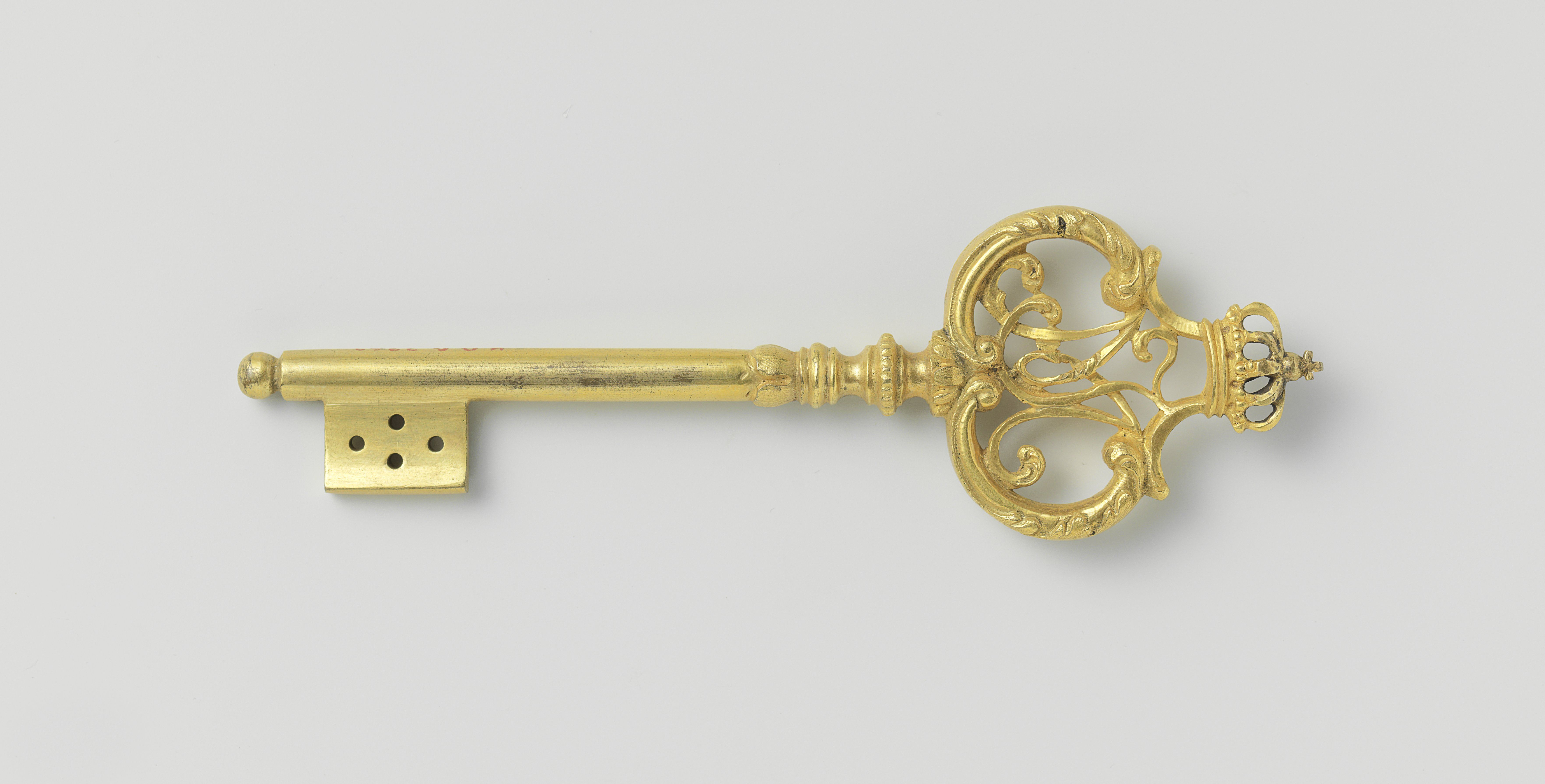 IdentificatieTitel(s): 39 sleutels uit de collectie van Emmanuel Vita IsraëlKamerheersleutelObjecttype: sleutel kamerheersleutel Objectnummer: BK-KOG-2342Omschrijving: Kamerheersleutel met in de greep het monogram M.J. De greep wordt gevormd door twee naar elkaar toegewende, met bladornament versierde C-voluten, het monogram insluitend en boven afgesloten door een koningskroon. De baard, Waar: van de zijvlakken concaaf zijn, heeft vier gaatjes.VervaardigingVervaardiger: anoniemDatering: ca. 1700 - ca. 1750Fysieke kenmerken: koperMateriaal: koper Techniek: verguldenAfmetingen: l 15,2 cm. × b 4,7 cm. OnderwerpWat: foliage, tendrils, branches ~ ornamentcrown (symbol of sovereignty)Verwerving en rechtenCredit line: Bruikleen van het Koninklijk Oudheidkundig GenootschapVerwerving: bruikleen 20-nov-1944Copyright: Publiek domein